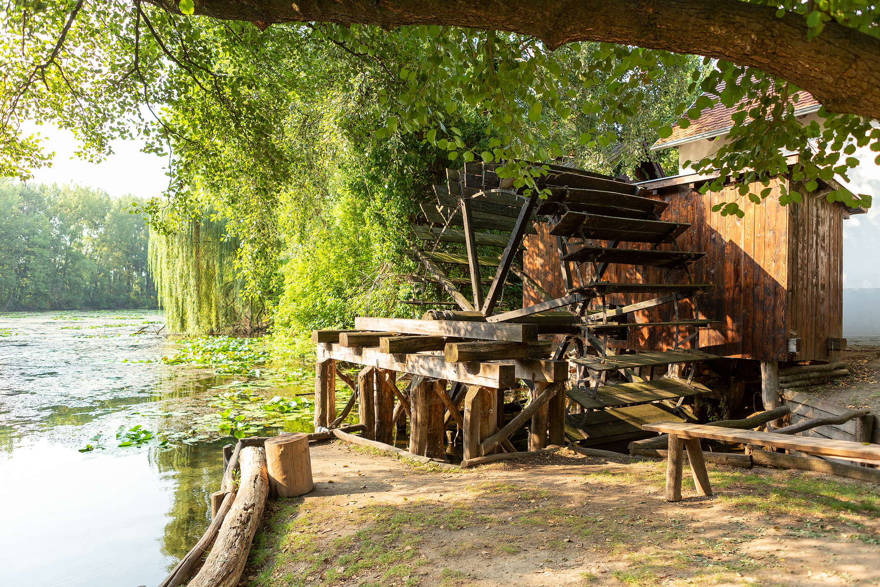 Mlynské koleso vodného mlyna v obci Dunajský Klátov na Klátovskom ramene Malého Dunaja.